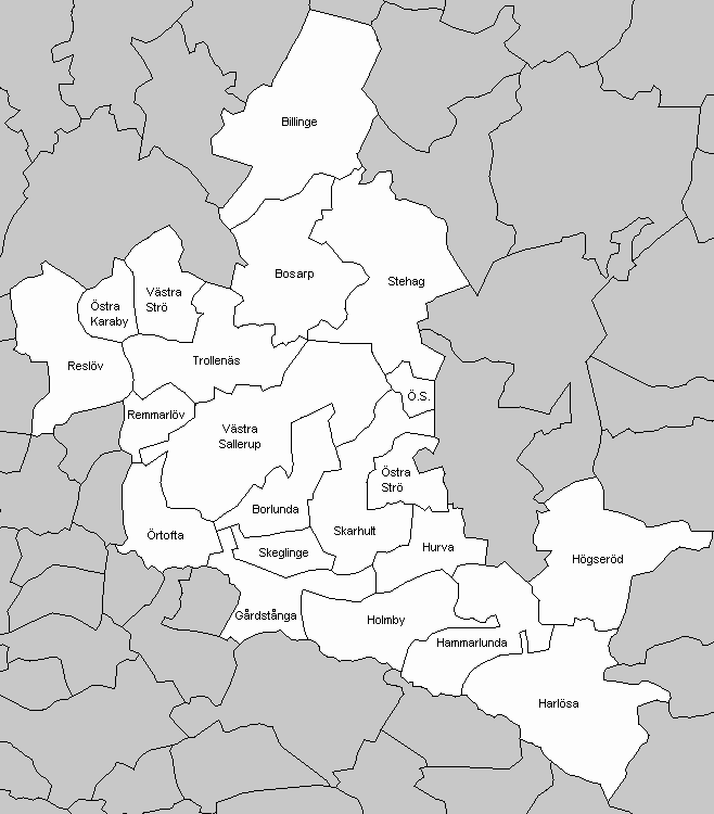 Socken in Eslöv